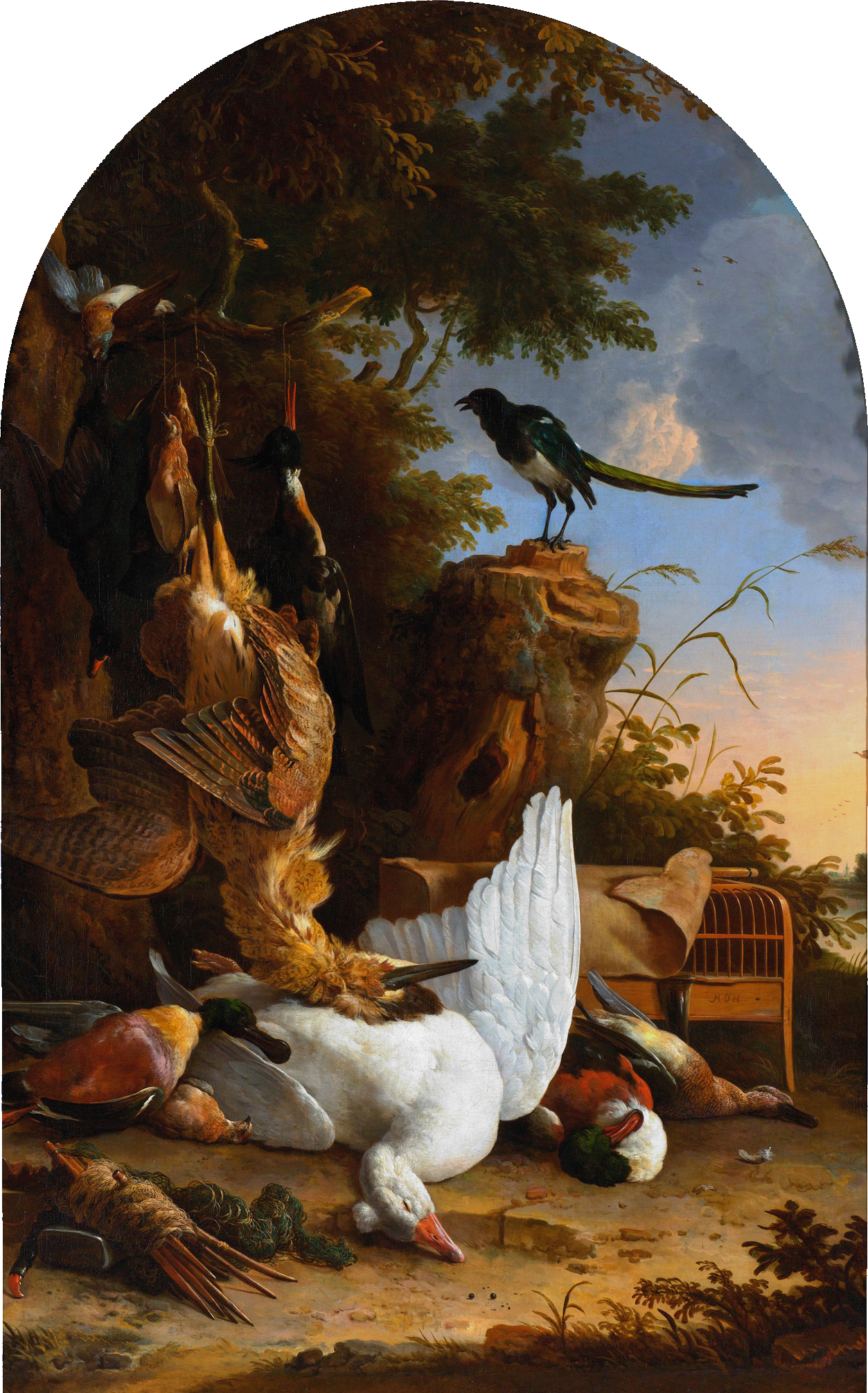 Pendant of File:Melchior d'Hondecoeter 003.jpg